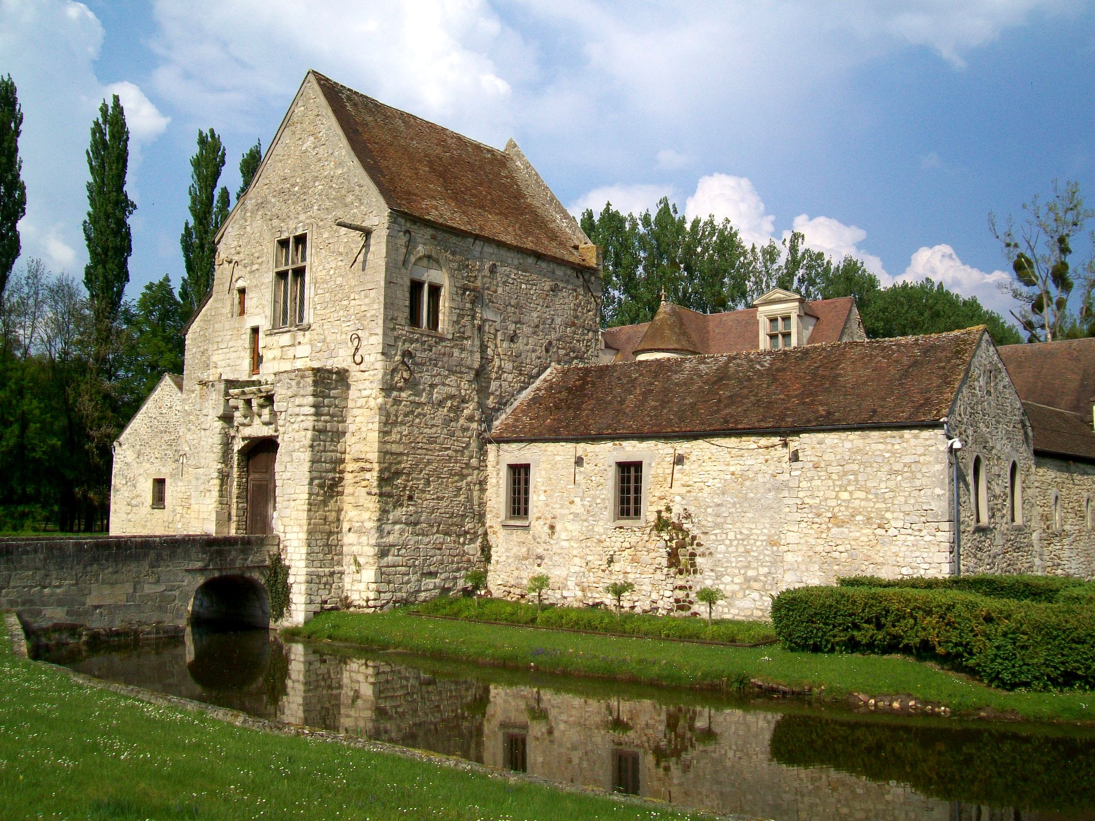 Le château avec sa porte fortifiée et le pont sur les douves ; vue depuis le sud-ouest en venant du village.